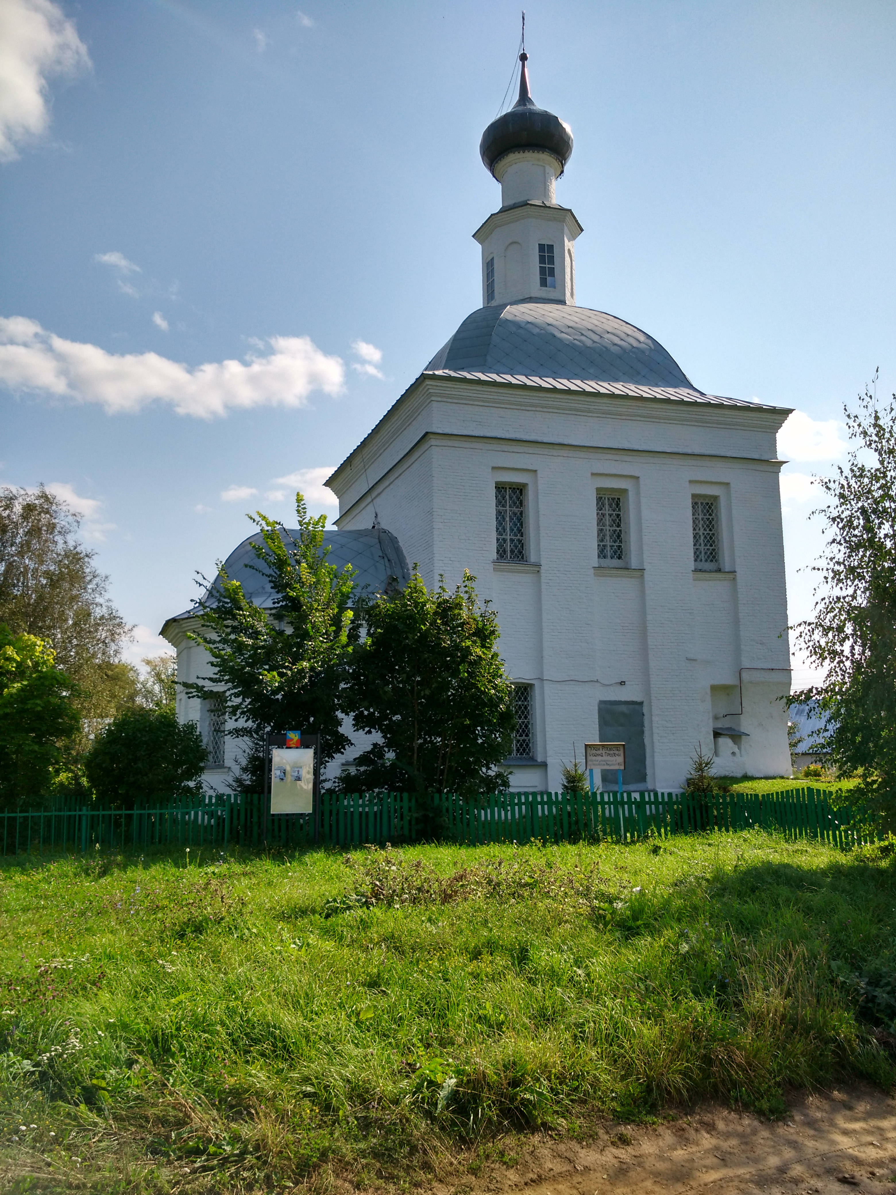 Церковь Иоанна Предтечи: Павловское, Суздальский район, Владимирская область